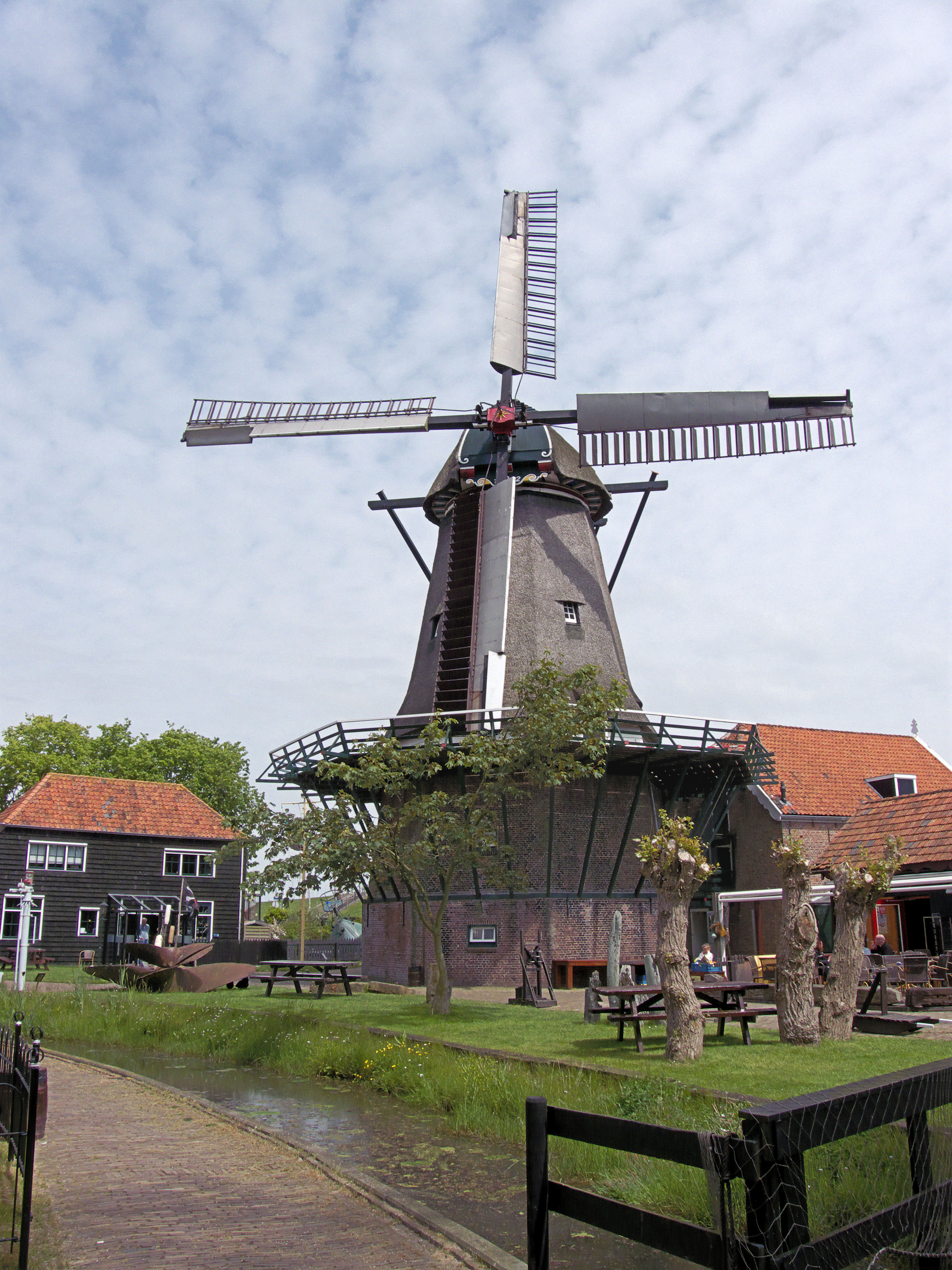 Molen De Traanroeier, Texel